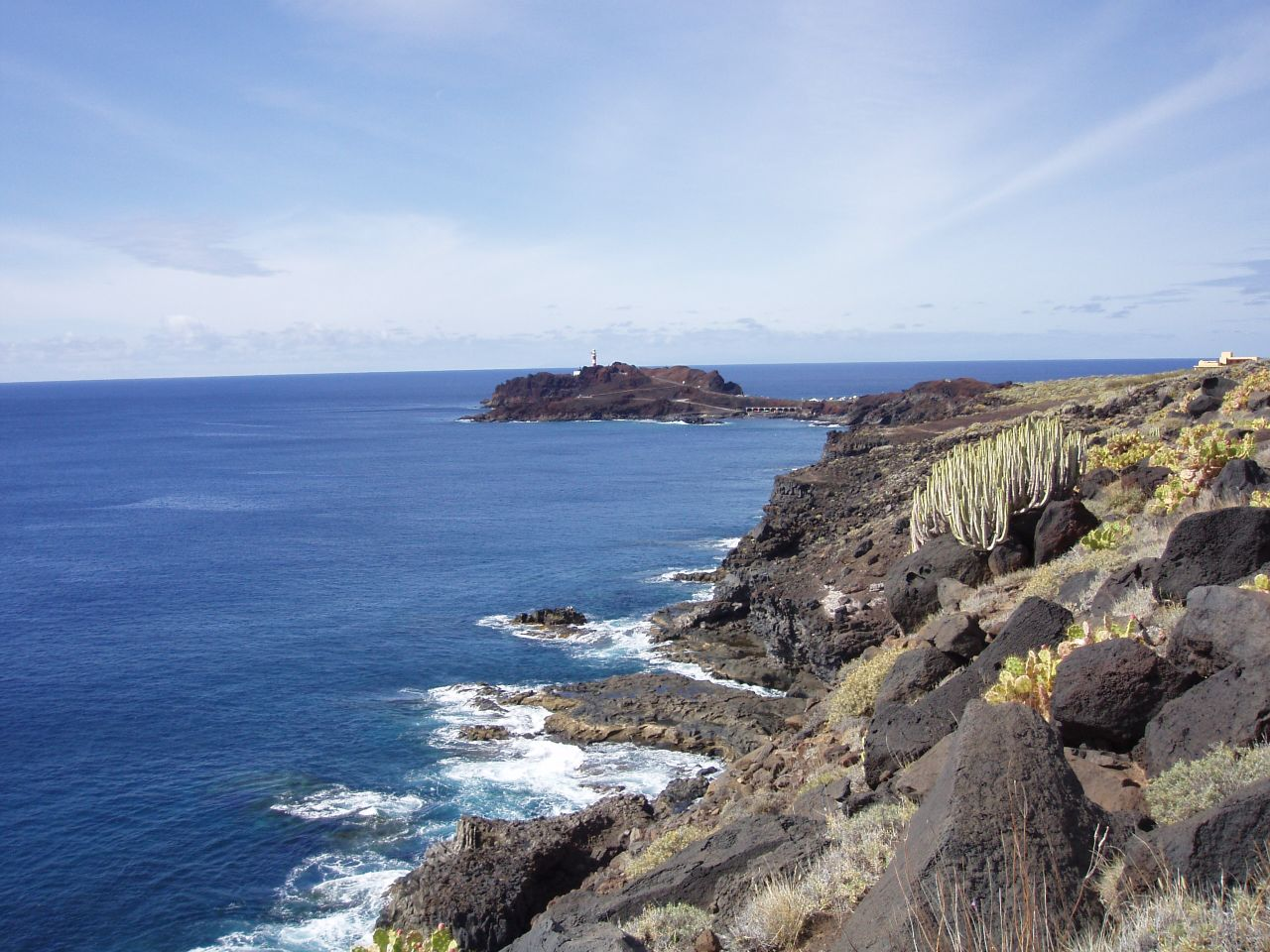 Punta de Teno, Tenerife, Canarias